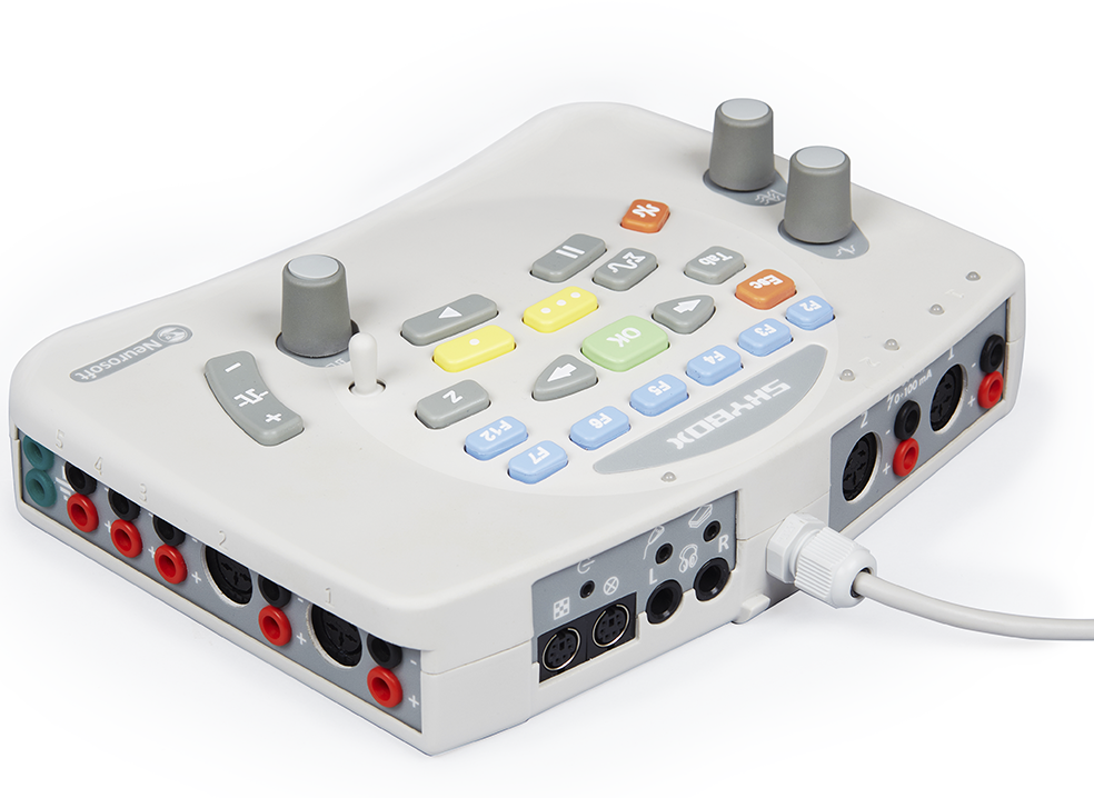 5-канальный электромиограф